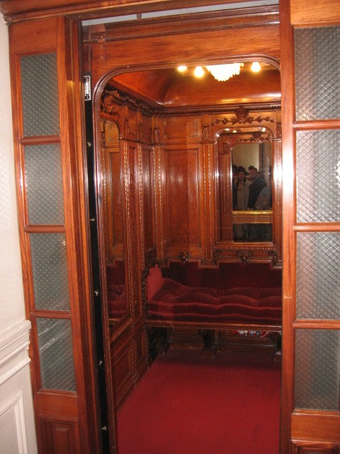 Ascensor presidencial de la Casa Rosada